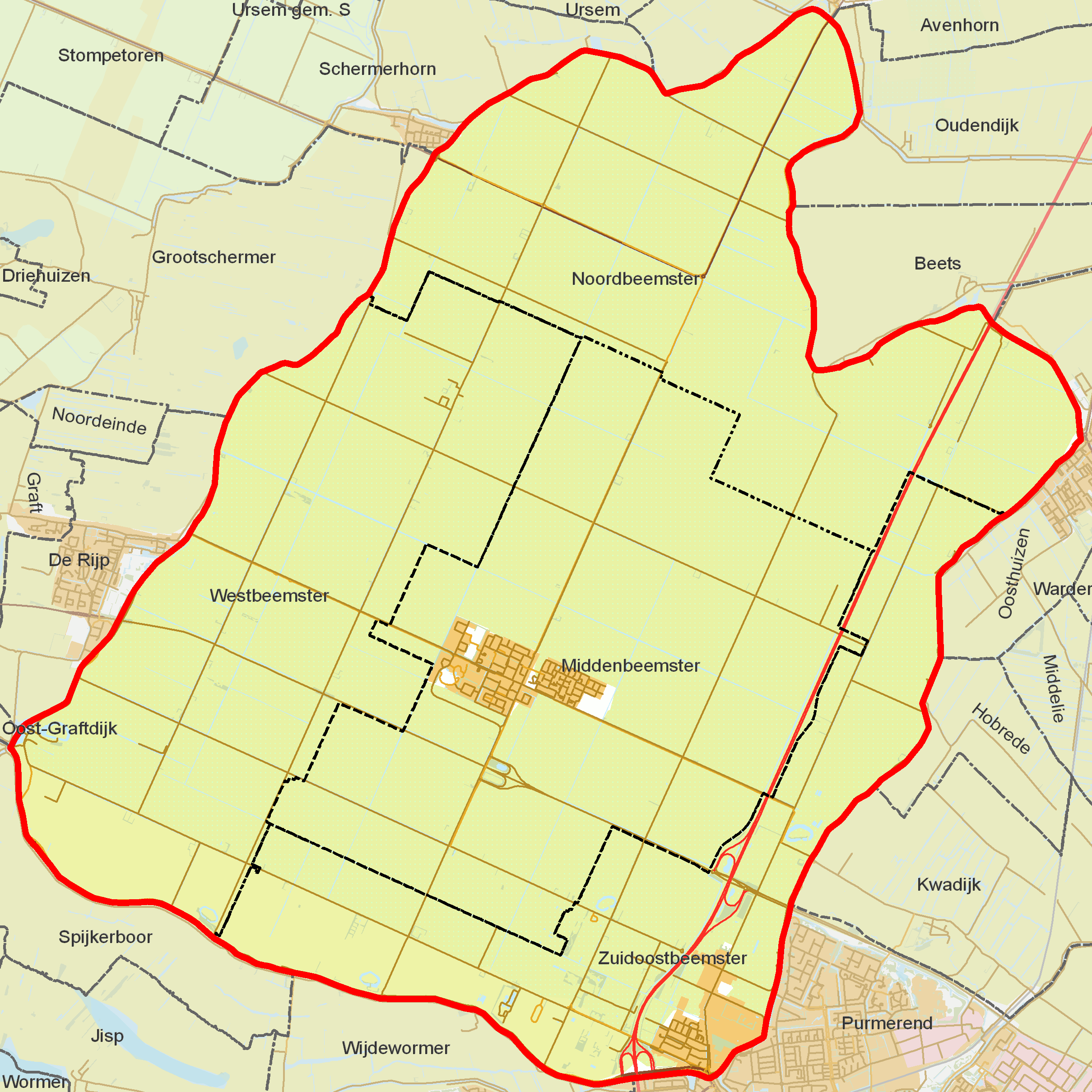 BAG woonplaatsen - Gemeente Beemster.png